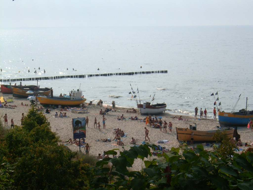 Rewal - plaża